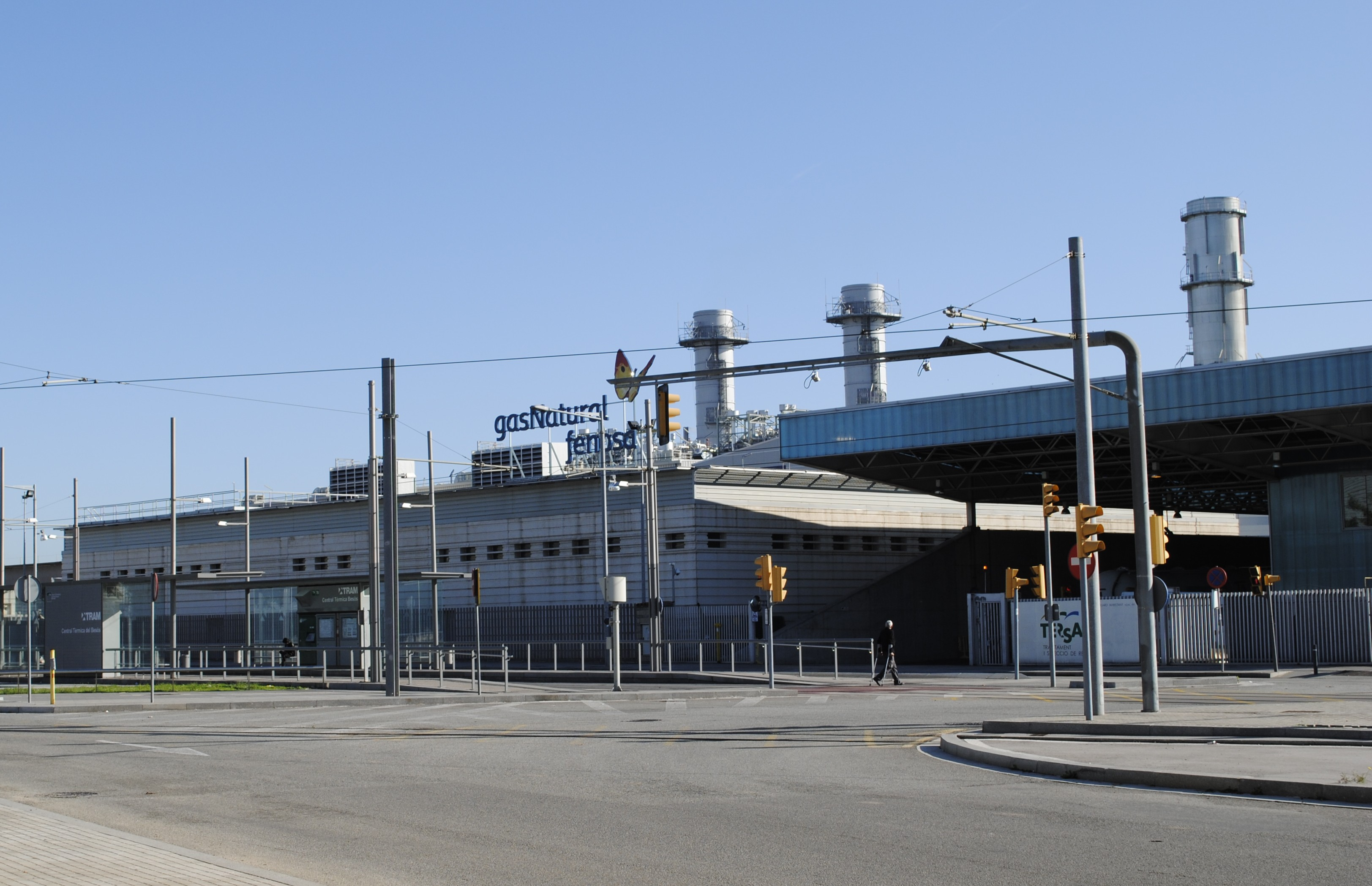 Estació Trambesòs Central Tèrmica del Besòs